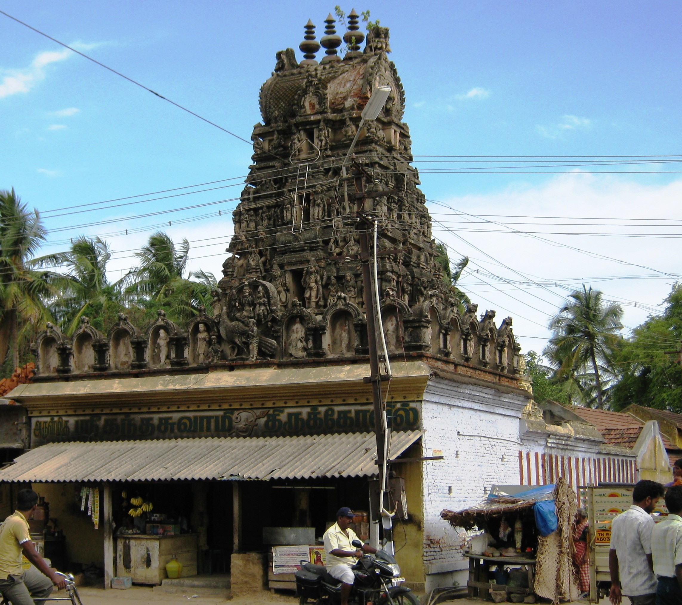 SRI KANDHASWAMY TEMPLE, Ayodhiyapatinam, Salem